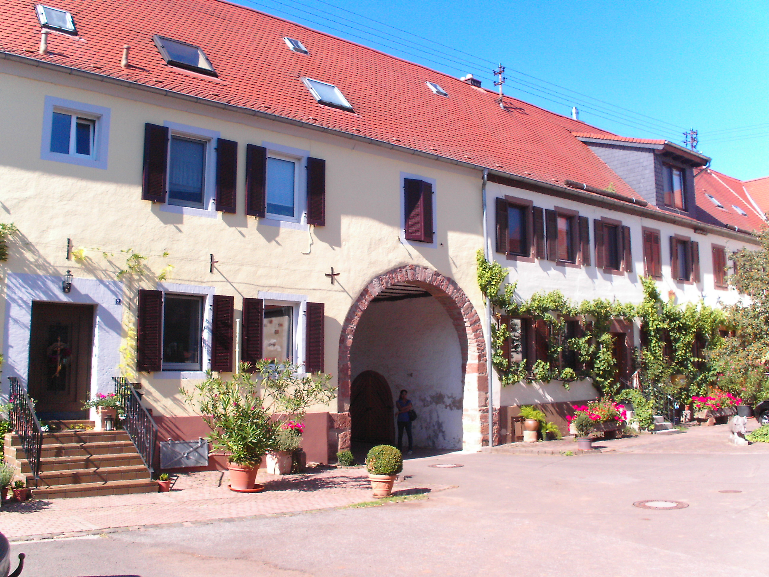 Münsterhof bei Dreisen, Rheinland-Pfalz, Gutshaus Innenseite (ehem. Kloster Münsterdreisen)